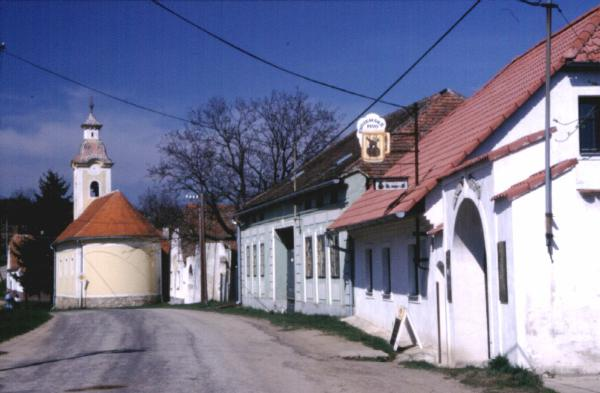 Hlavní ulice v Čížově, části obce Horní Břečkov, okres Znojmo